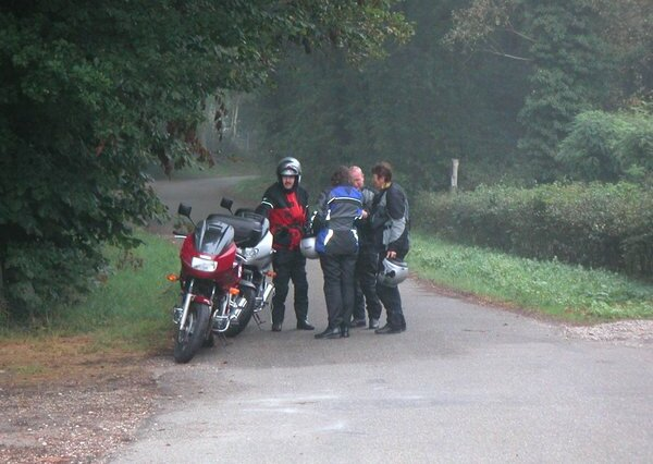 Motorrijders orientatierit.